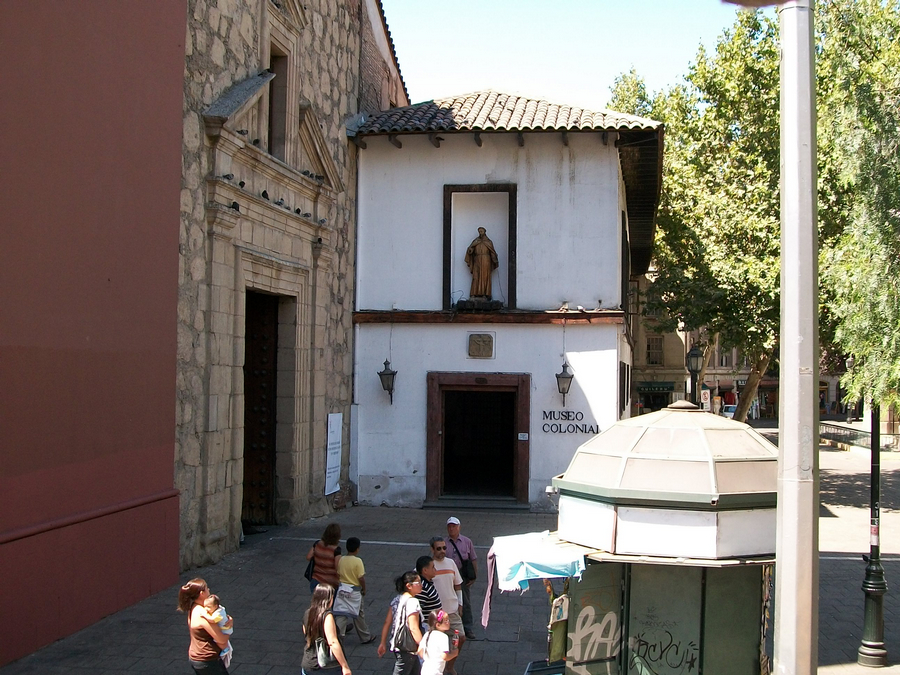 Ingreso al Museo Colonial en la Iglesia de San Francisco, de Santiago de Chile.